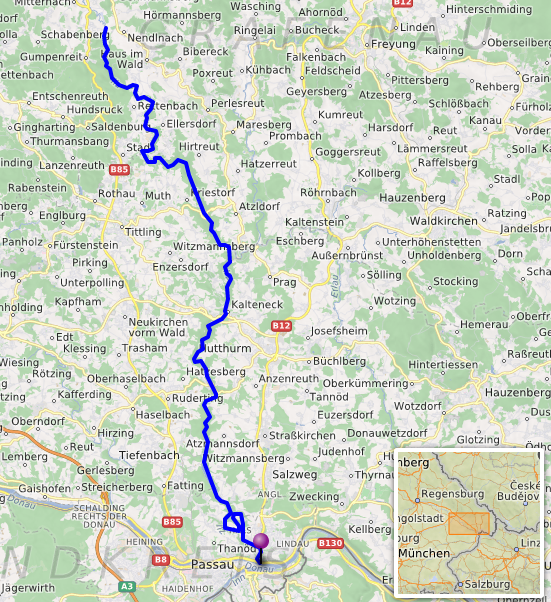 Carte d'après openstreetmap. This map may be incomplete, and may contain errors. Don't rely solely on it for navigation.